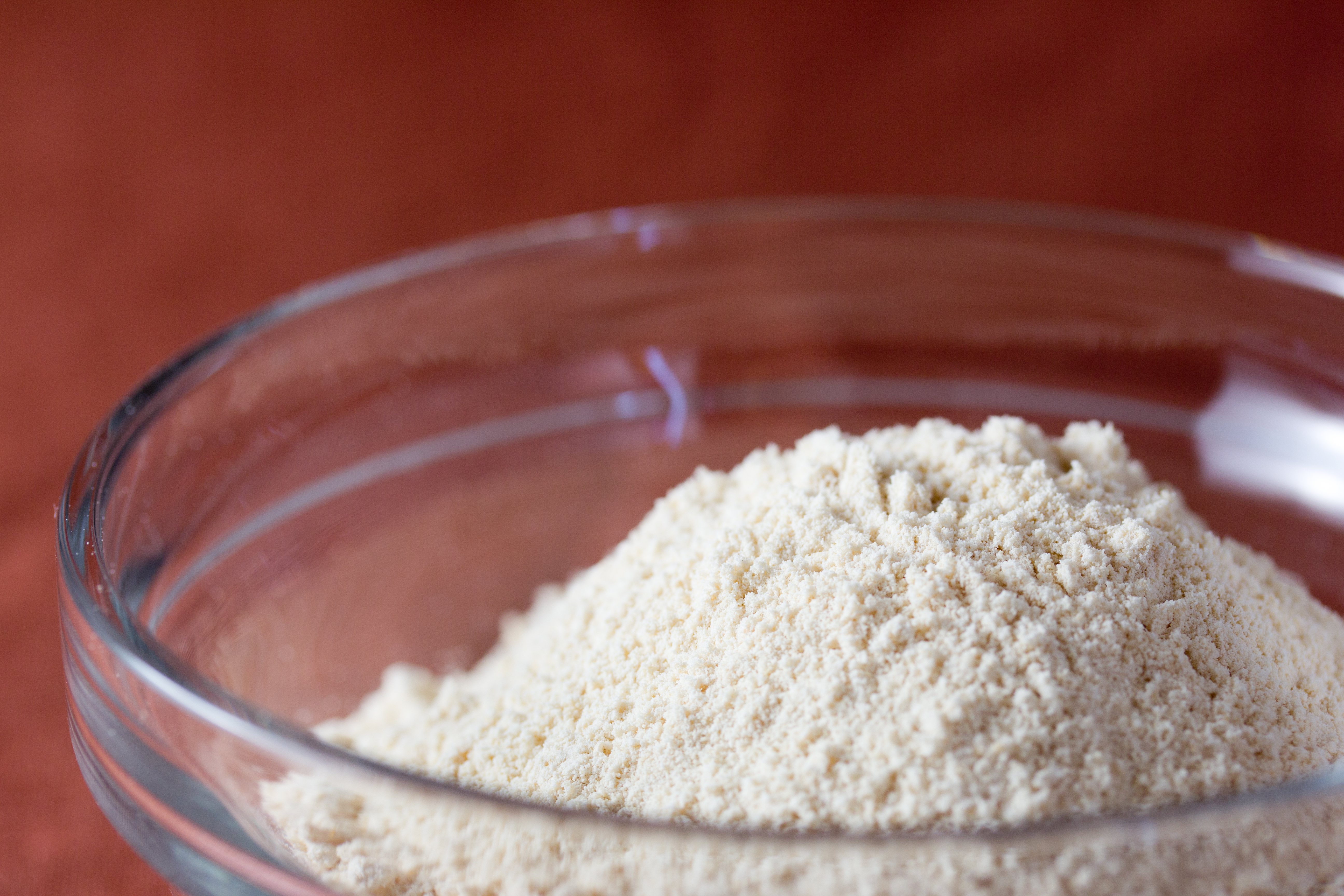 Soy Okara Flour